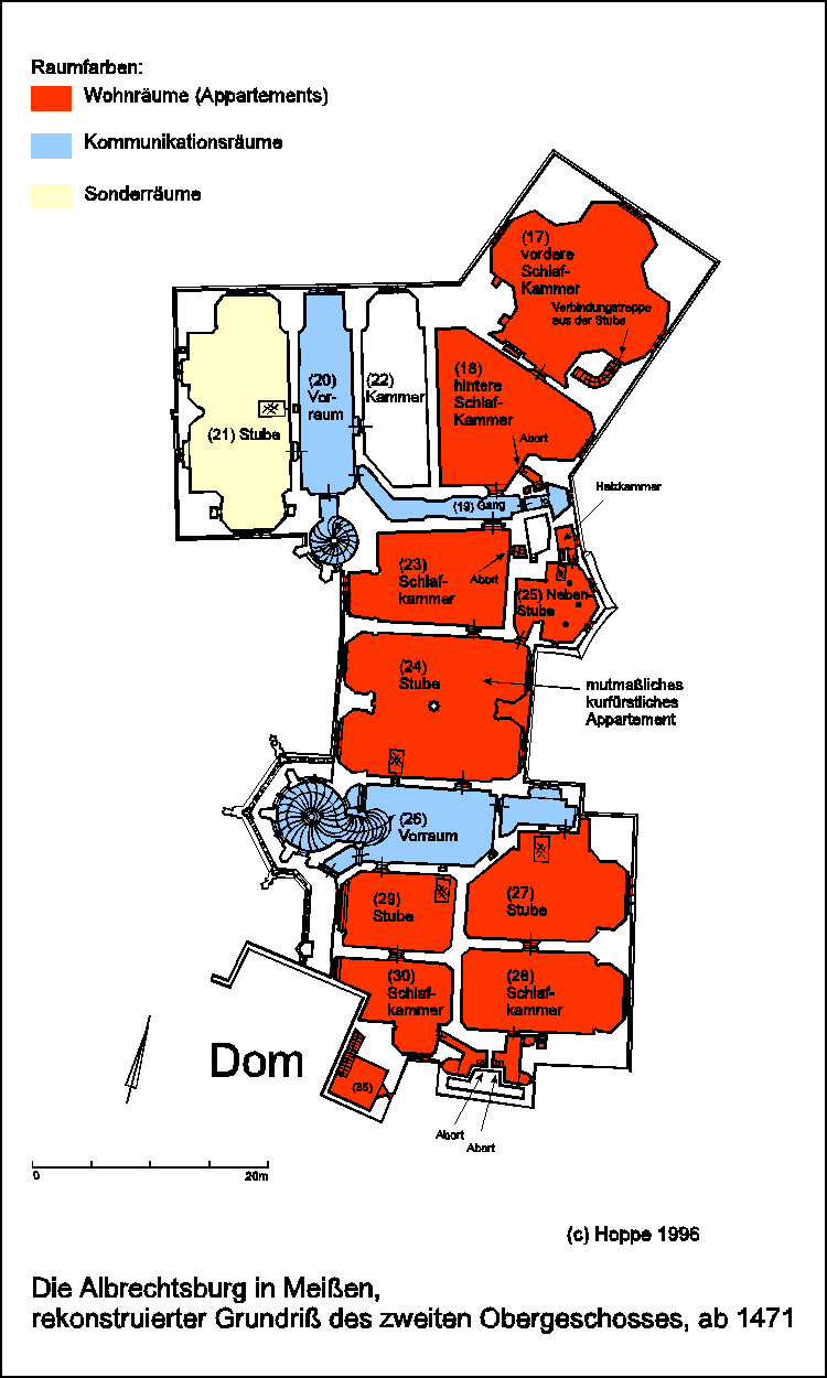 Albrechtsburg, Rekonstruktion der Raumfunktionen des zweiten Obergeschosses um 1500, nach Hoppe 1996